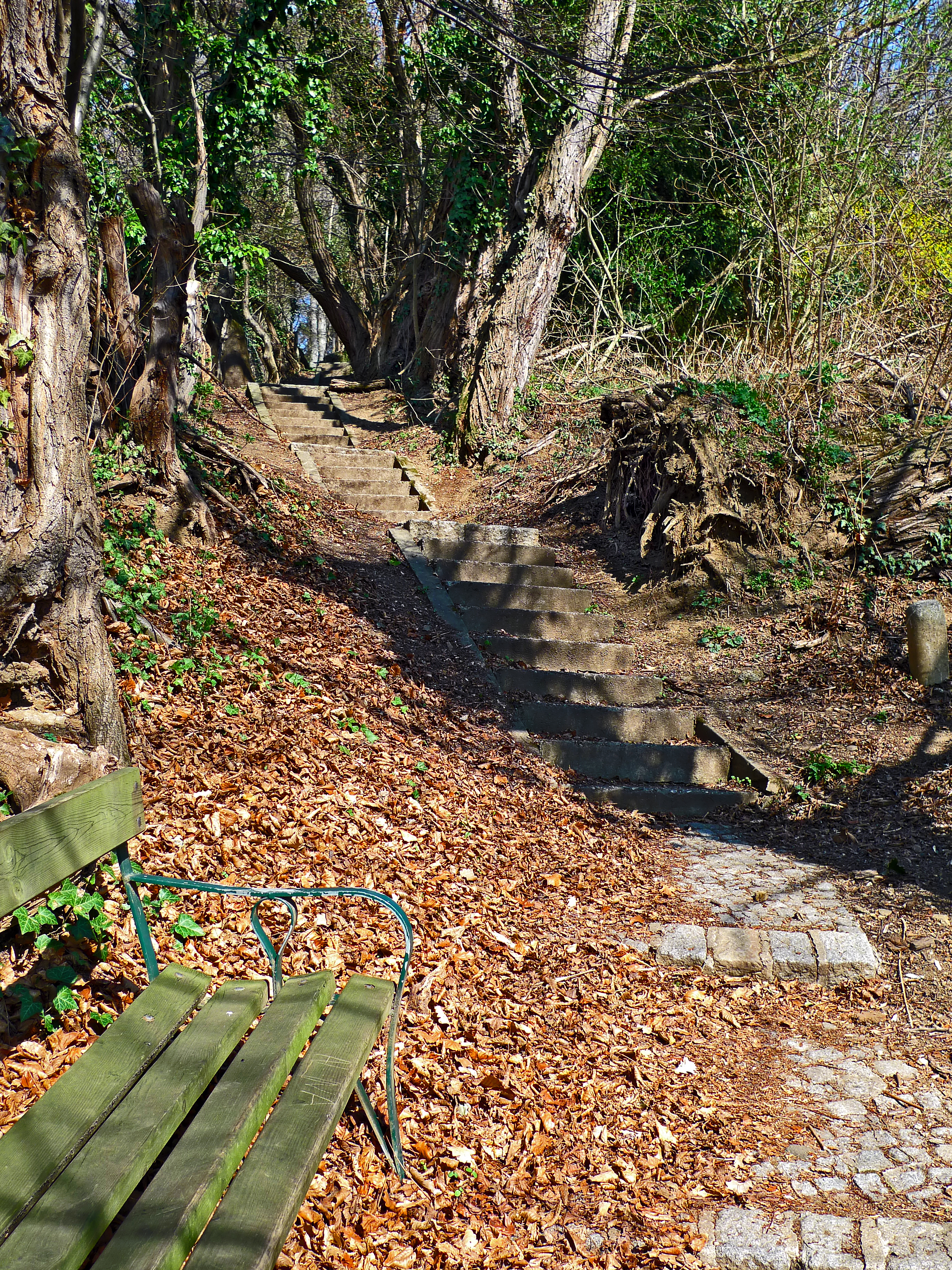 Graz Reinerkogel Jakobsleiter